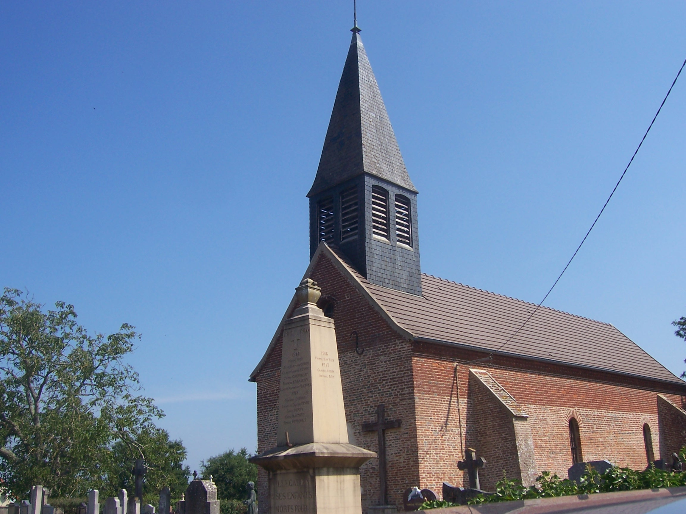 Eglise de Villegaudin